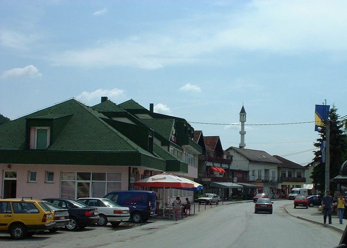 Unknown language: Bosanska Otoka, BiH